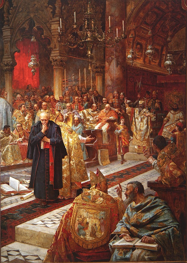 Splitski crkveni sabor 925. godine, rad Celestina Medovića u Hrvatskom institutu za povijest u Zagrebu